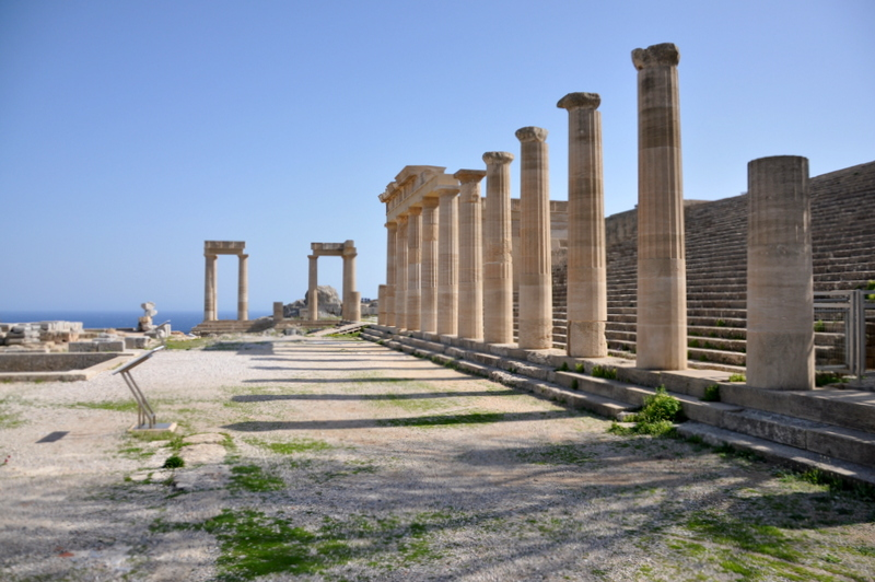 Akropol w Lindos (wyspa Rodos, Grecja). Zdjęcie obejmuje rekonstruowaną właśnie (2016) część propylejów, niegdyś wiodących ku świątyni Ateny. Prócz nowego surowca, Grecy używają oczywiście możliwie wielu elementów oryginalnych. Nie da się zrekonstruować całości propylejów, a to z uwagi na późniejsze zmiany w systemie obronnym cytadeli. Stan oryginałów był zły, z uwagi na lokalizację twierdzy - na samym skraju potężnej, morskiej przepaści, z częstymi tu silnymi wiatrami i także cząstkami wody morskiej w powietrzu...